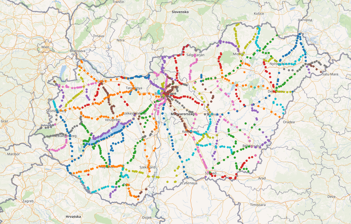 Magyarország vasútállomásainak koordinátái grafikusan megjelenítve This map may be incomplete, and may contain errors. Don't rely solely on it for navigation.